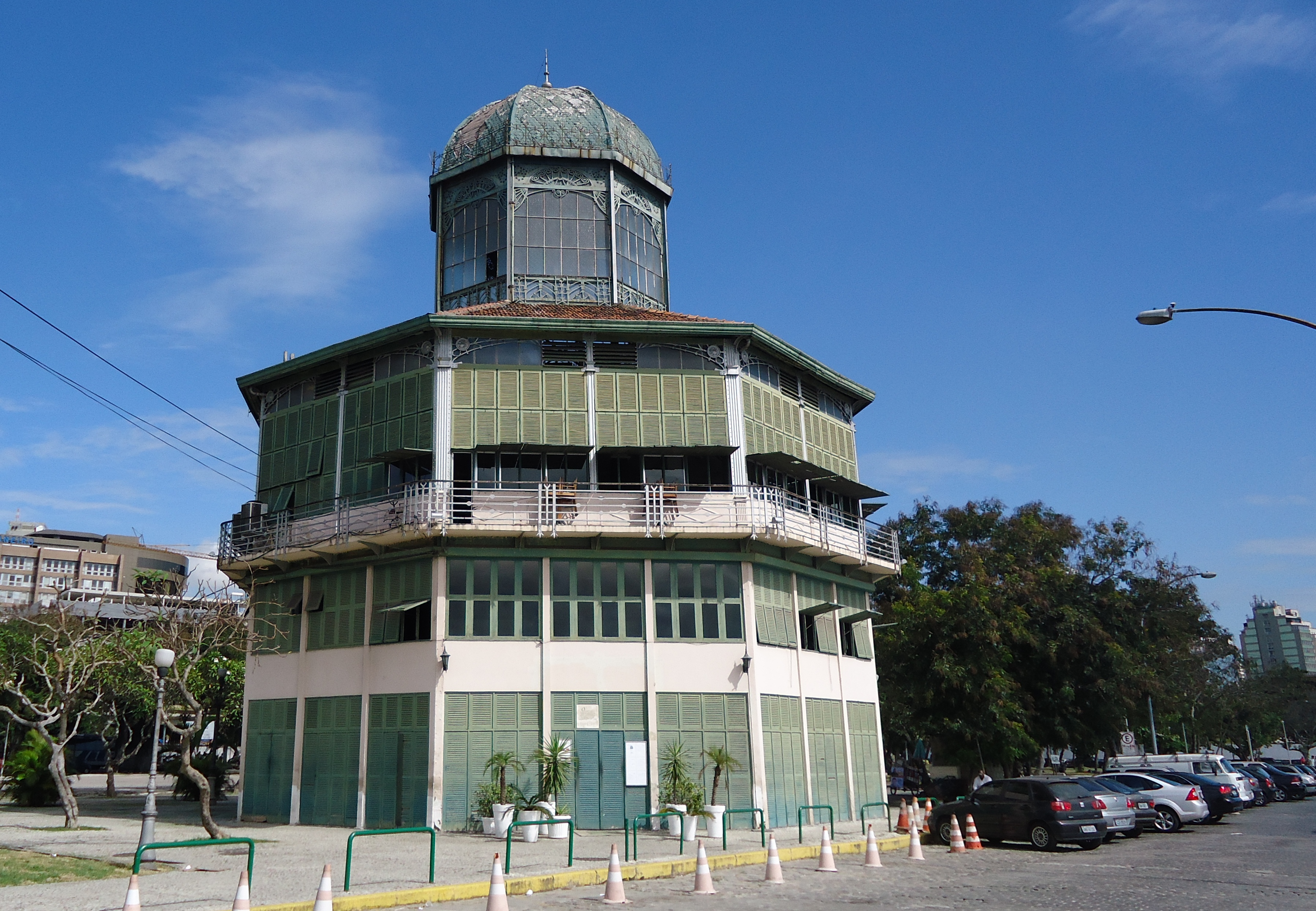 Restaurante Albamar, praça Marechal Âncora 186, centro histórico da cidade do Rio de Janeiro, estado do Rio de Janeiro, Brasil.